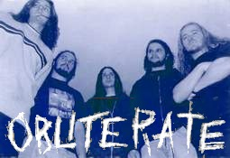 Obliterate: Line-up 2000